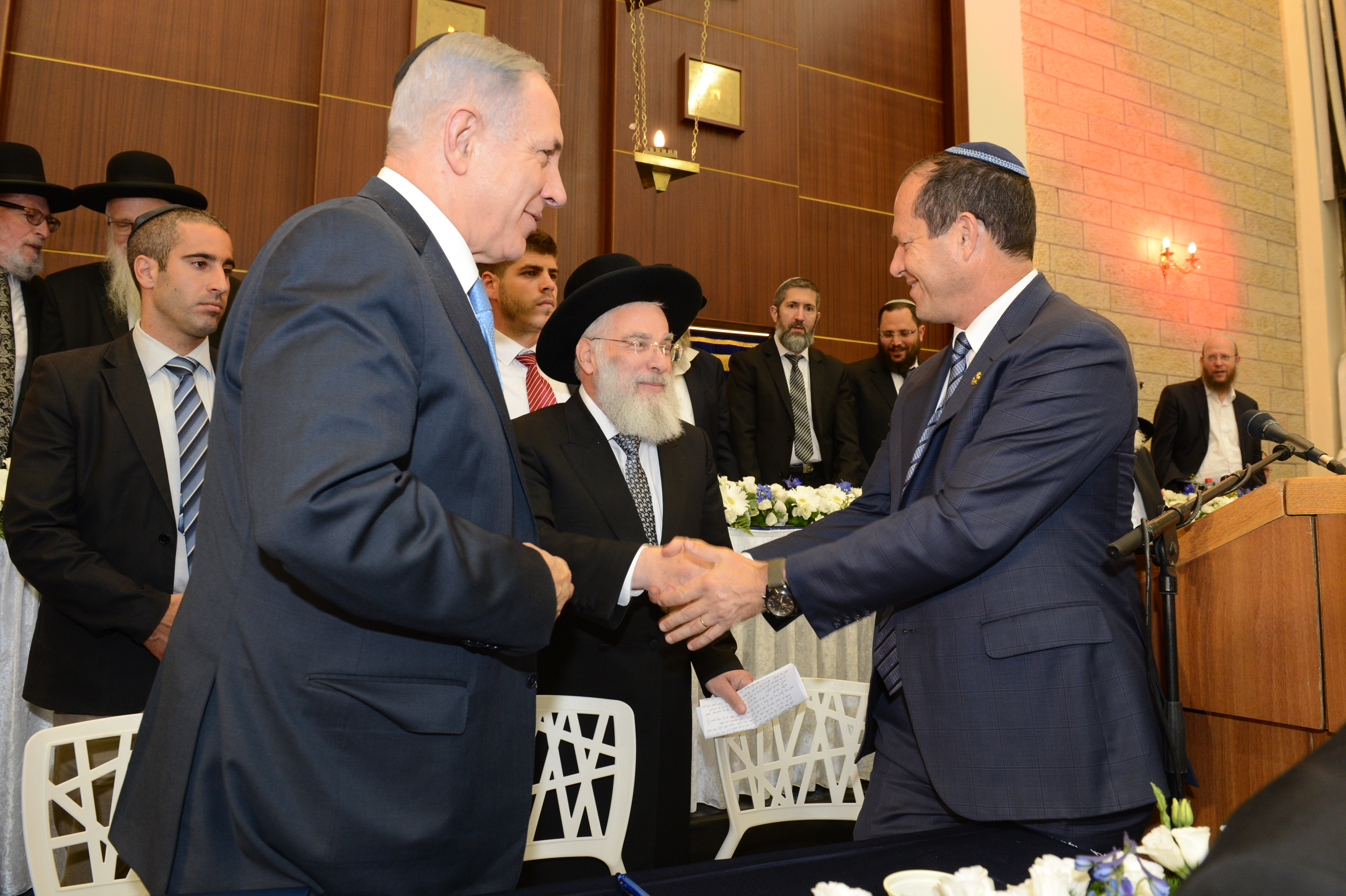 ישיבת מרכז הרב.